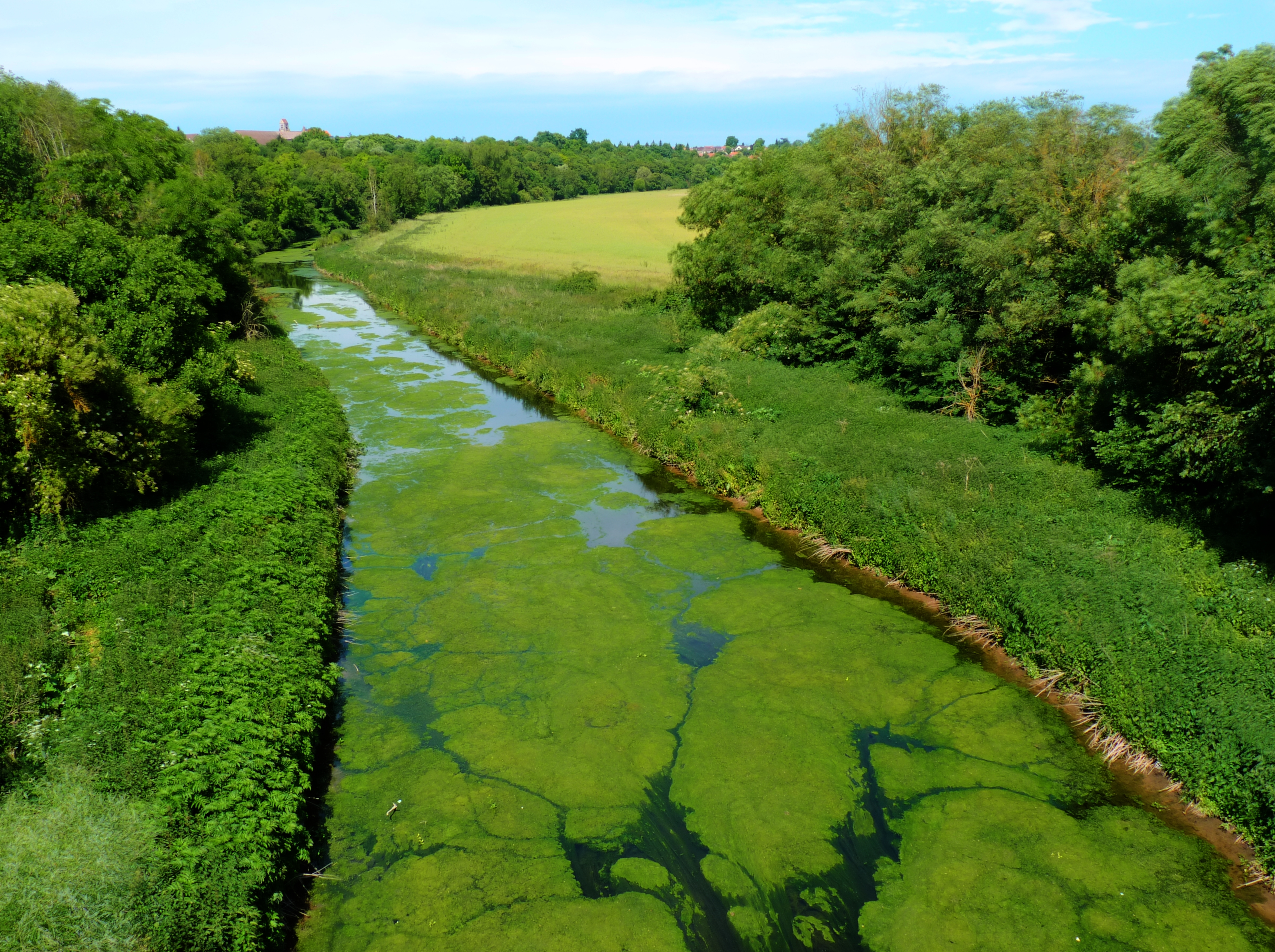 Une photographie à grande gamme dynamique de l'Yerres vue depuis l'ancienne ligne de chemin de fer de Paris-Bastille - Marles-en-Brie transformée en chemin des roses à proximité de Solers.